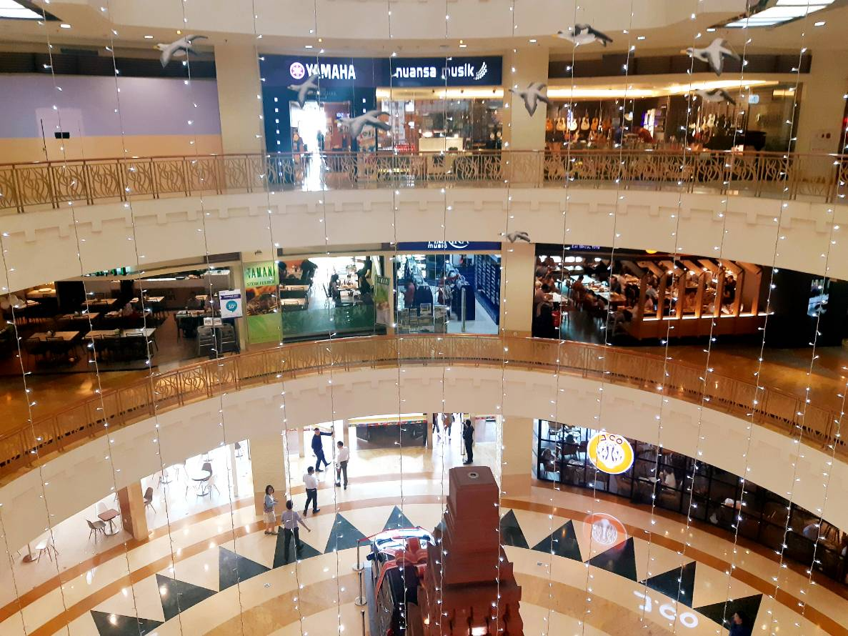 Tampak dalam dari Mal Artha Gading